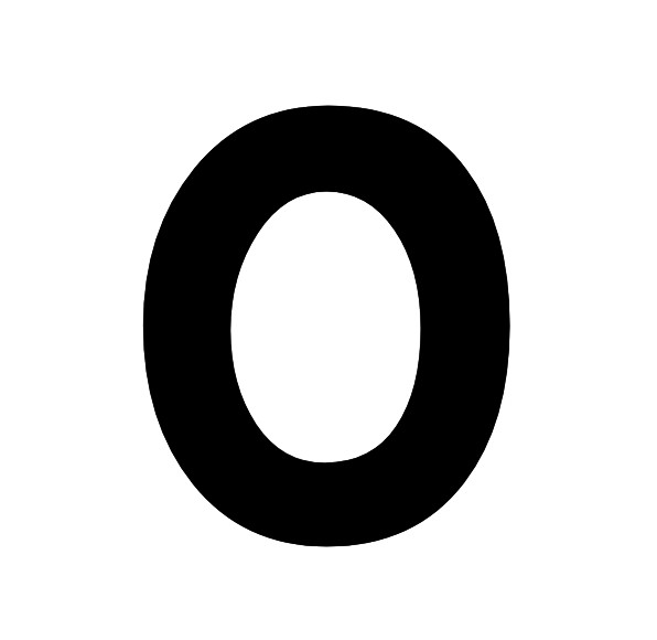 ഠ മലയാളം അക്ഷരം